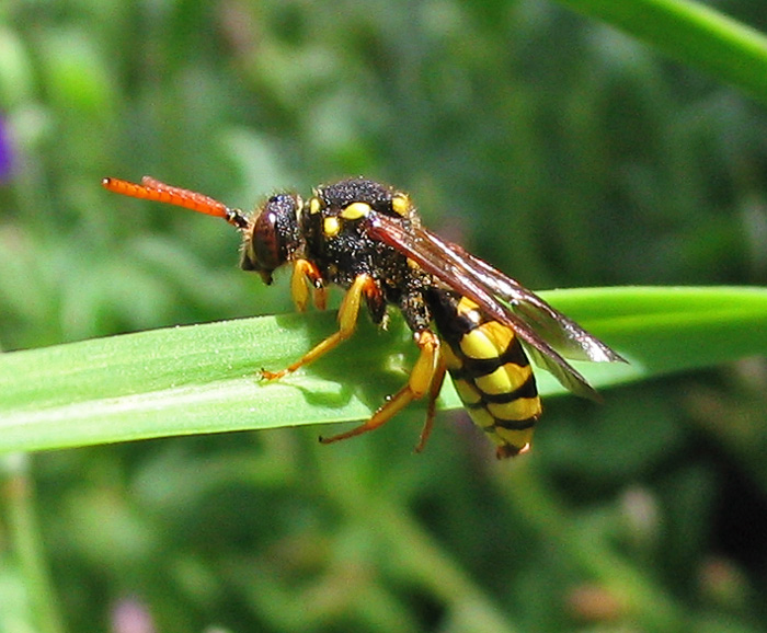 Beschreibung: Westenbiene (Nomada succincta) Fotograf: Darkone, 27. Mai 2005